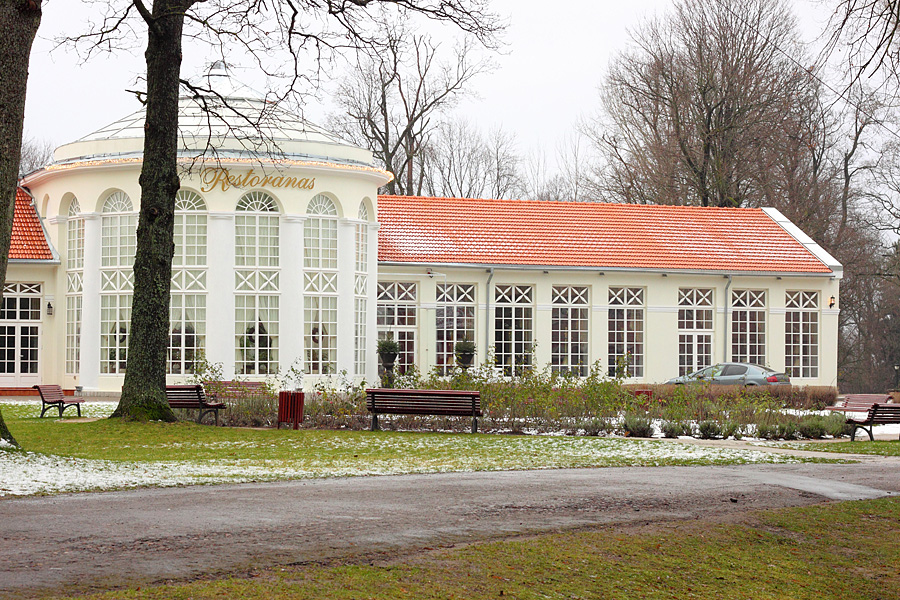 Raudondvario davaro oranžerija.